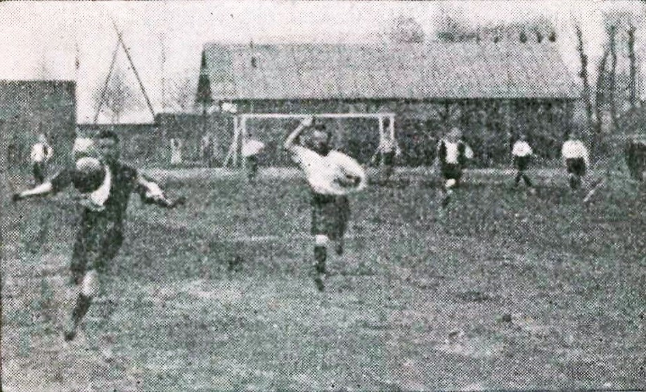 Finale championnat de France de football 1904 le 17 avril 1904